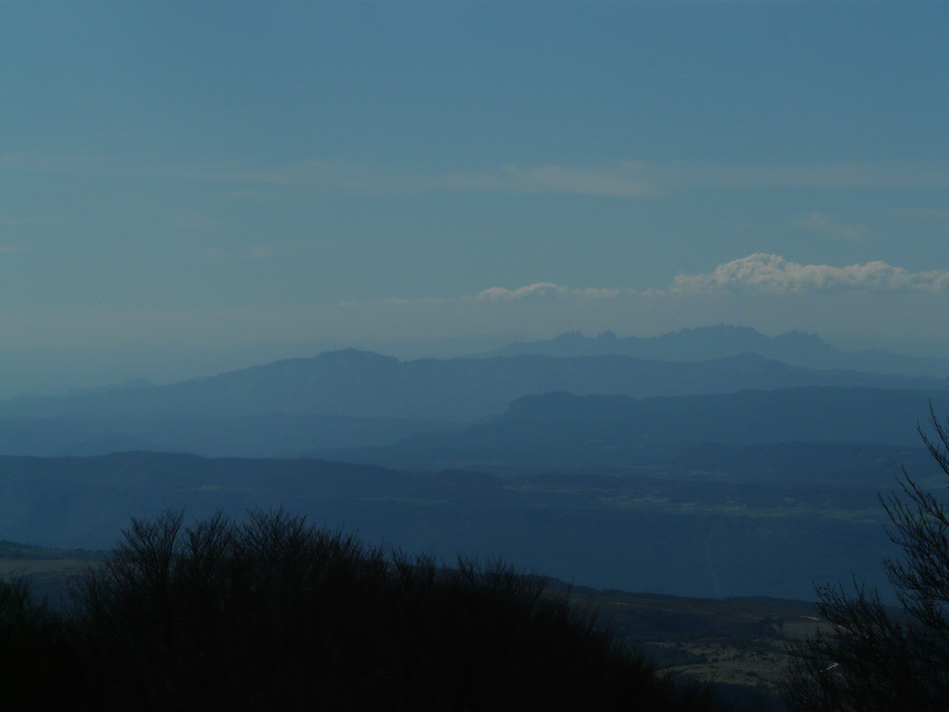 La Mola (Vallès Occidental) (Matadepera). Sant Llorenç del Munt. This is a a photo of an emblematic summit in Catalonia, Spain, with id: CE-285114006 Object location41° 38′ 28.64″ N, 2° 01′ 04.5″ E